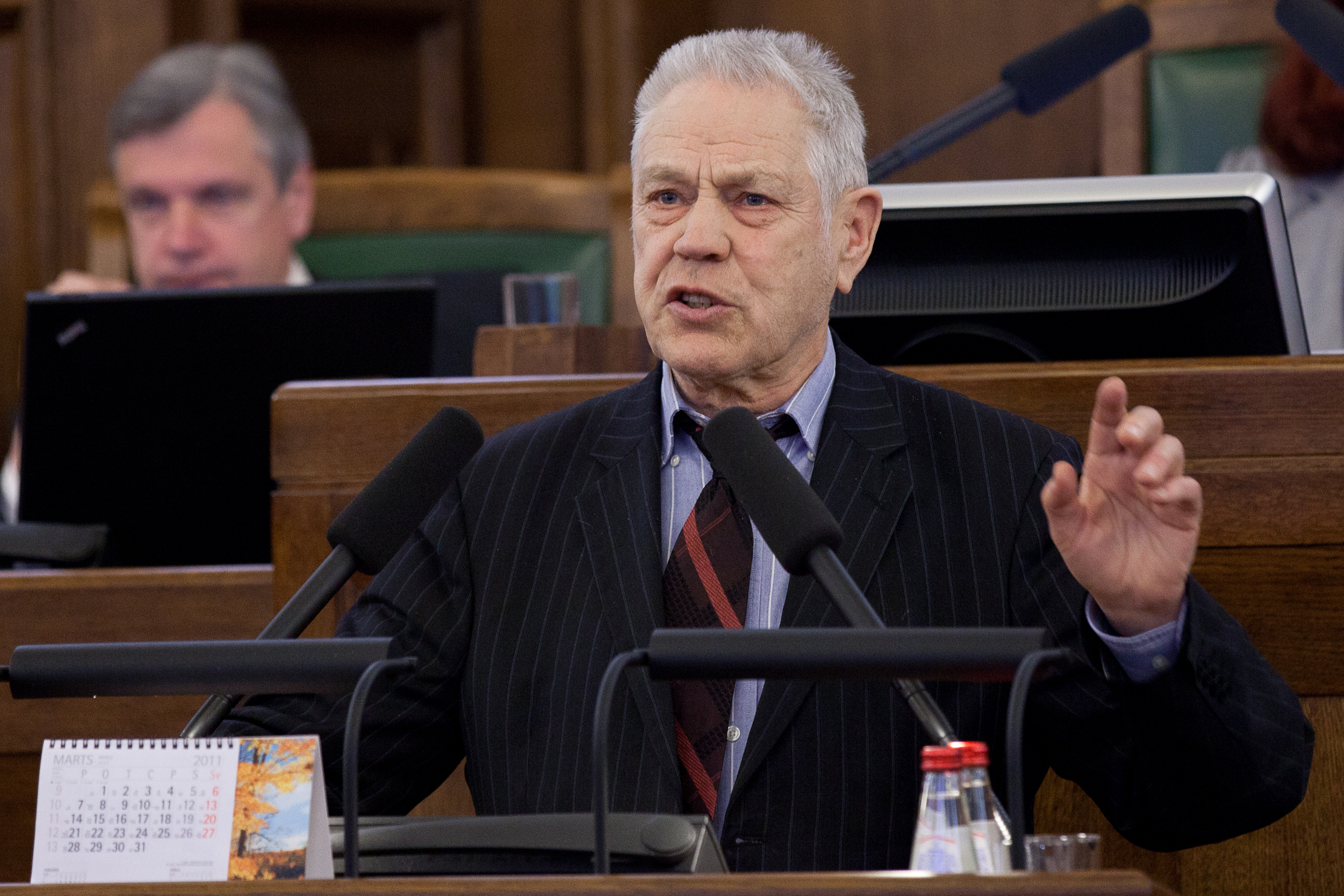 2011.gada 7.aprīlis. Darbs Saeimas sēdē. Attēlā: deputāts Visvaldis Lācis (VL-TB/LNNK). Foto: Saeima